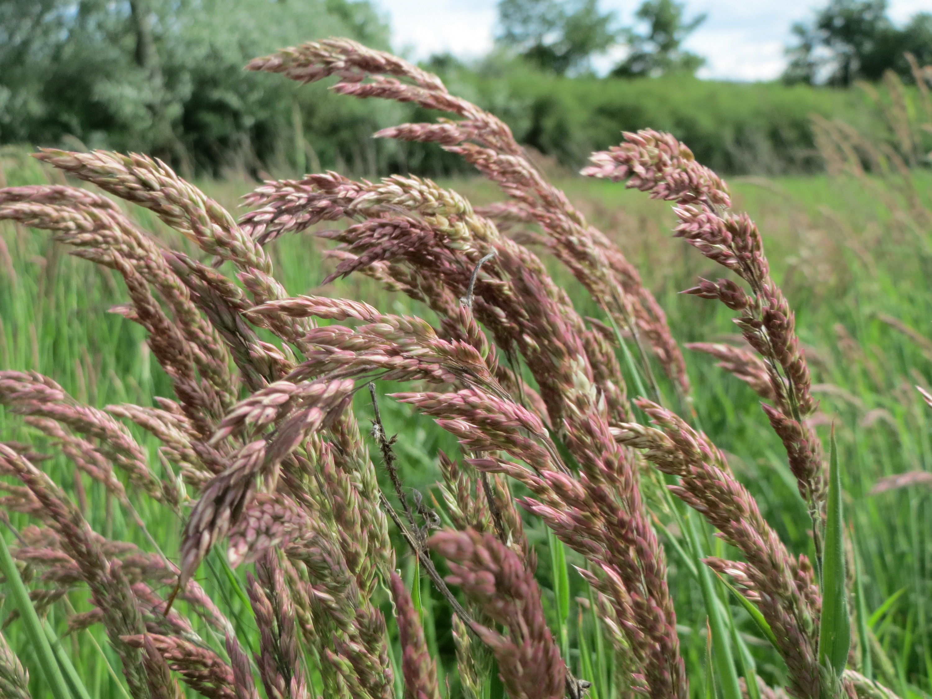 Wolliges Honiggras (Holcus lanatus) im Landschaftsschutzgebiet Hockenheimer Rheinbogen